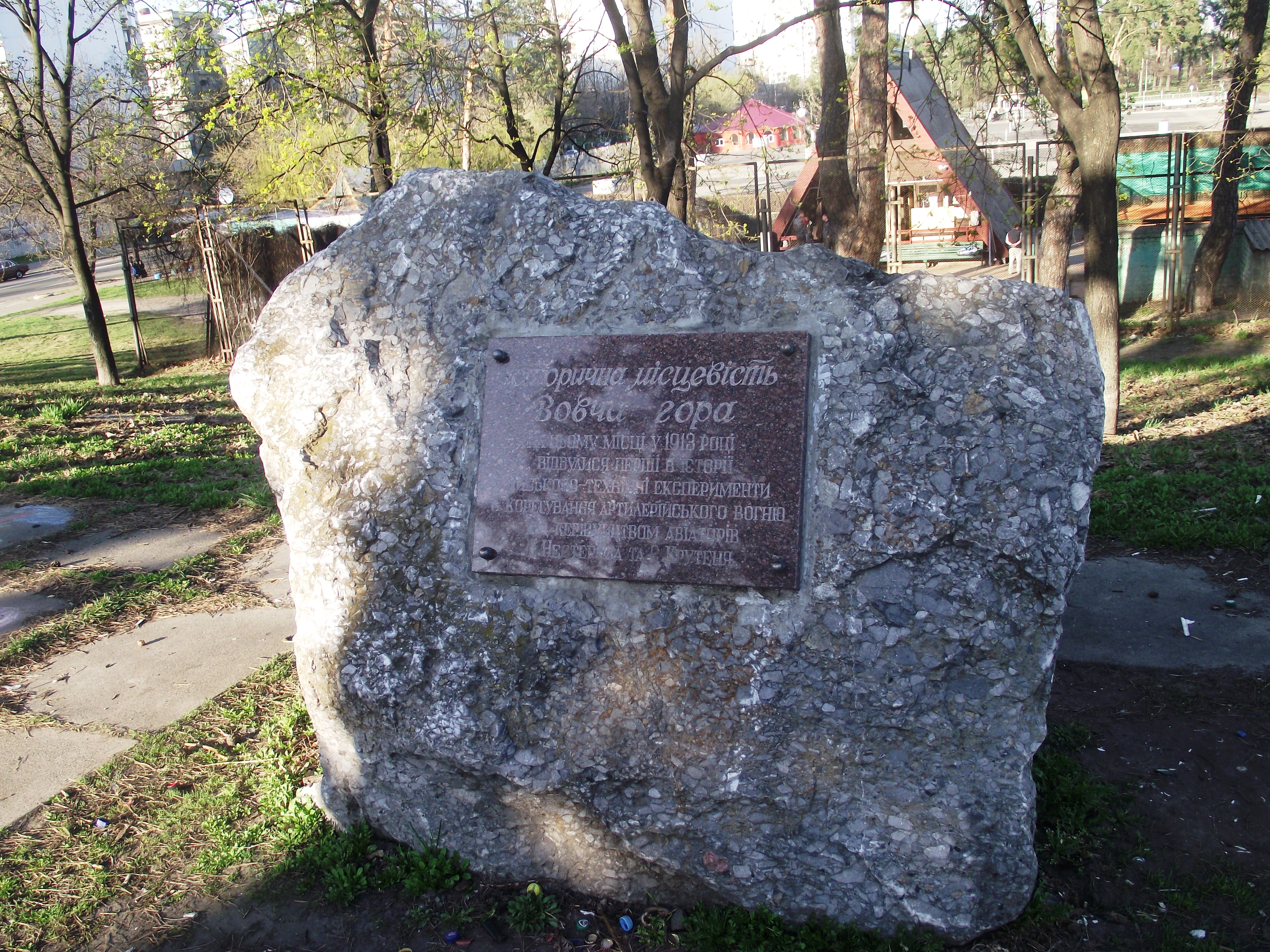 Пам'ятний знак на місці військових маневрів 1913 року під керівництвом П. М. Нестерова та Є. М. Крутеня